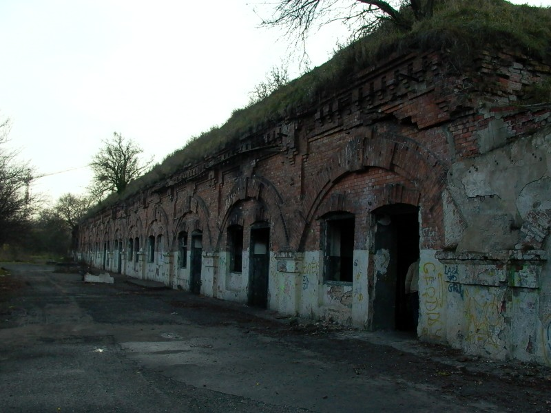 Fotografia przedstawia istniejący fragment koszar Fortu IV Twierdzy Warszawa. Autor: Zbigniew Strucki